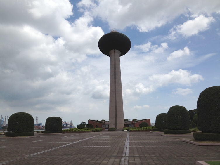 港公園展望台からは鹿島港を一望できます。